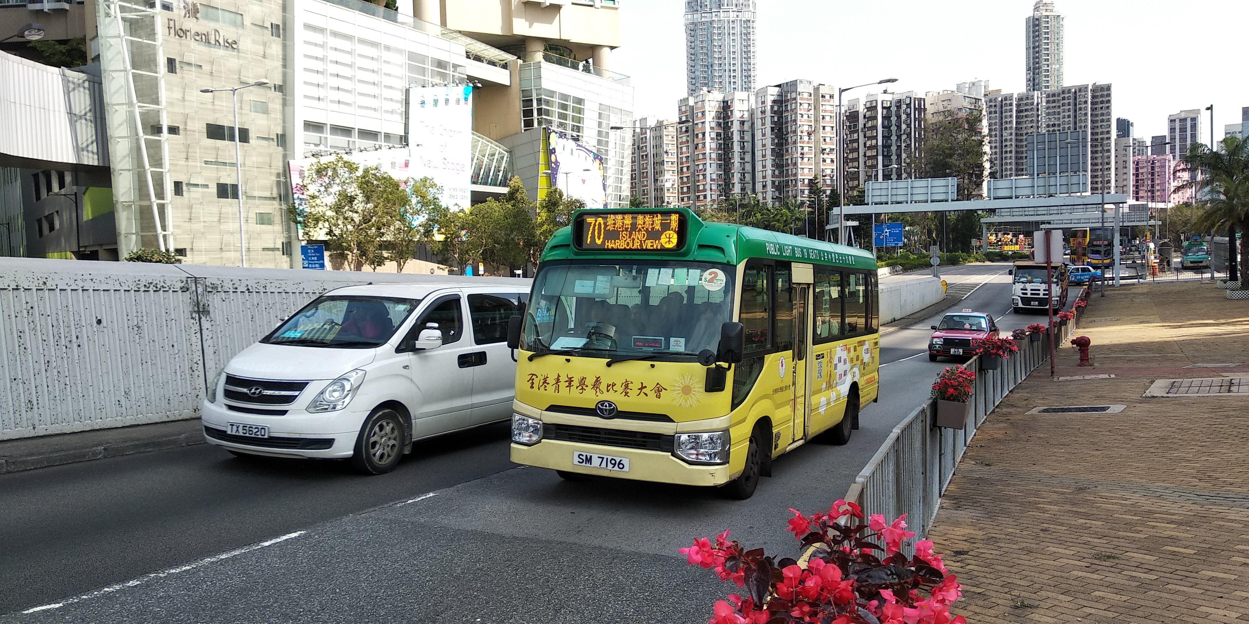 中文（香港）: 在大角咀填海區櫻桃街行駛的九龍區專線小巴70線。